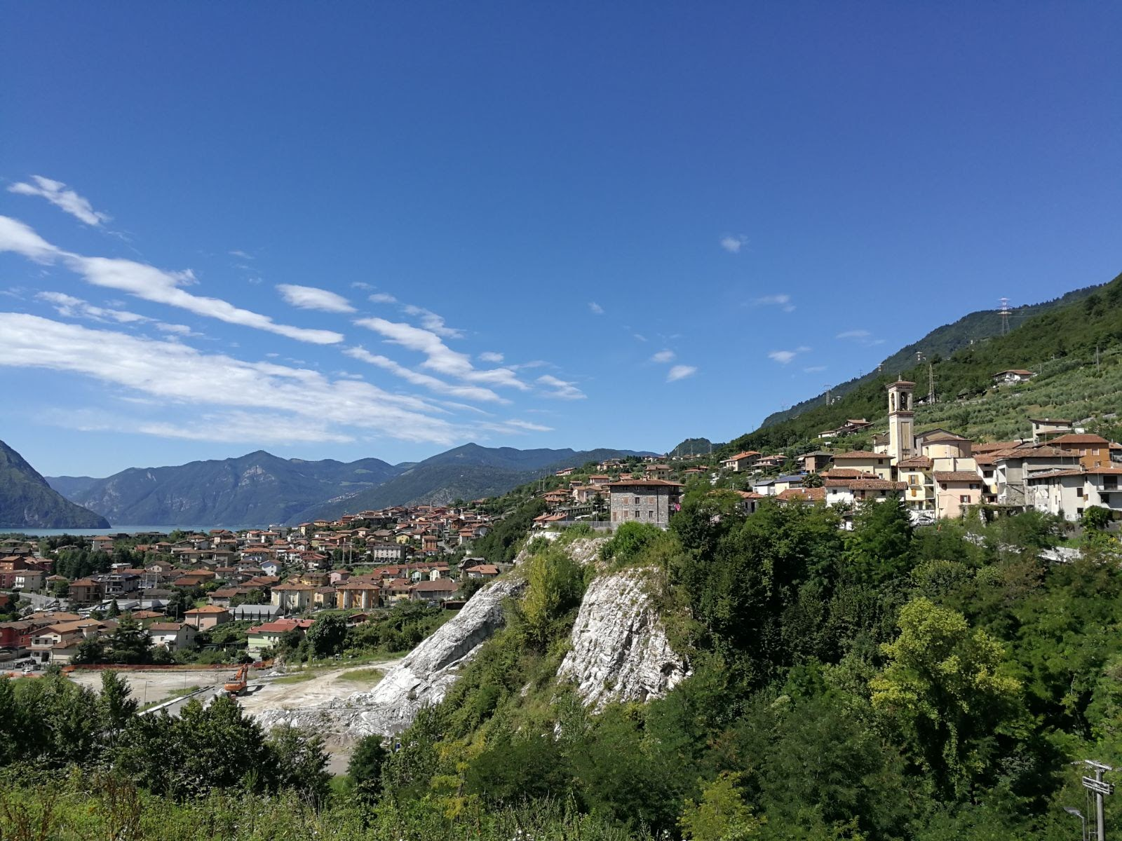 panorama